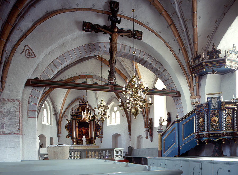 Fra Alstads kyrka i Skåne, Sverige